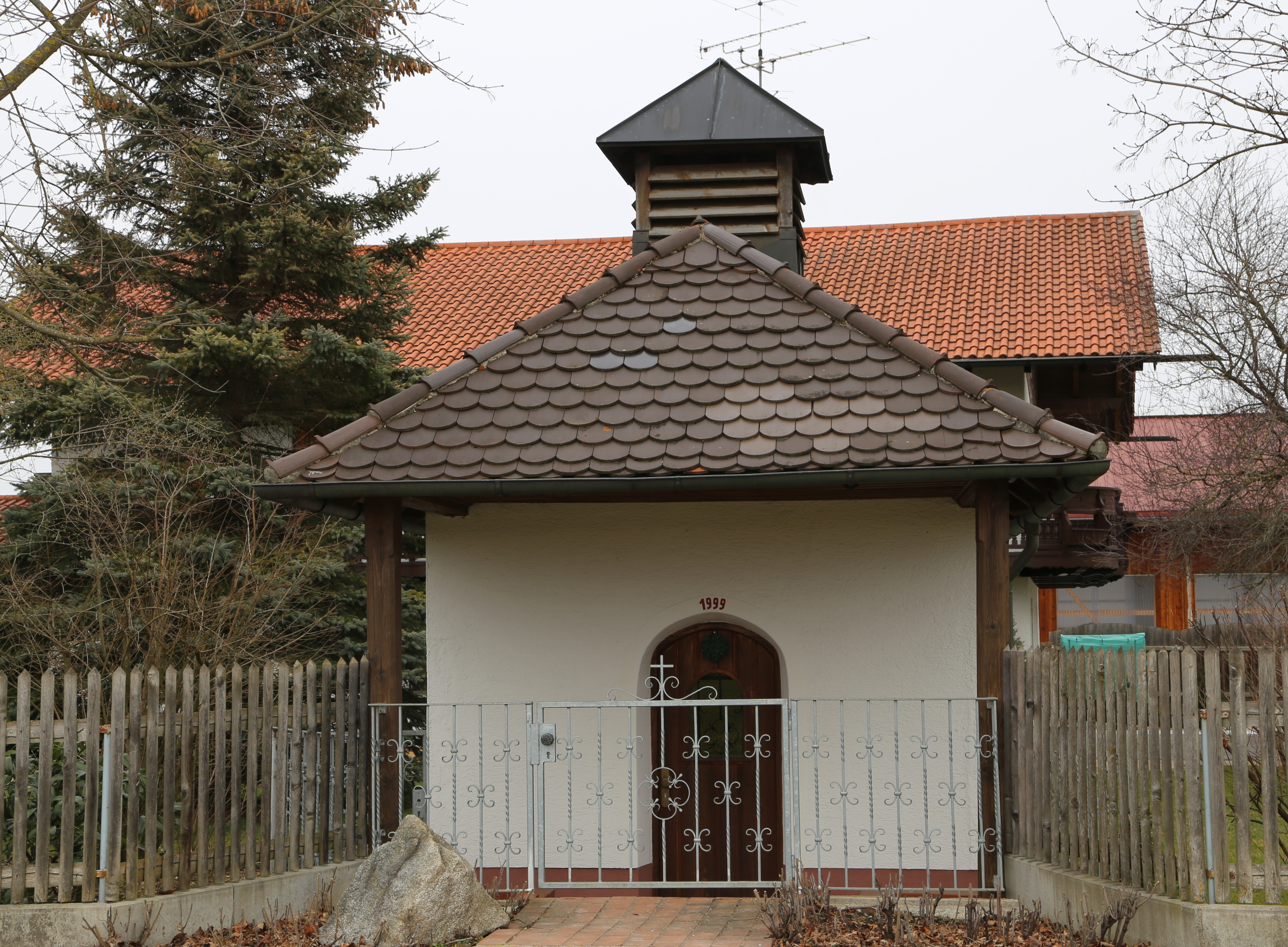 Kirchtruderinger Weg 4, Solalinden, Putzbrunn; Wegkapelle, kleiner Putzbau mit gerade schließendem Chor und weitem Vordach, wohl noch 18. Jahrhundert, mit Ausstattung